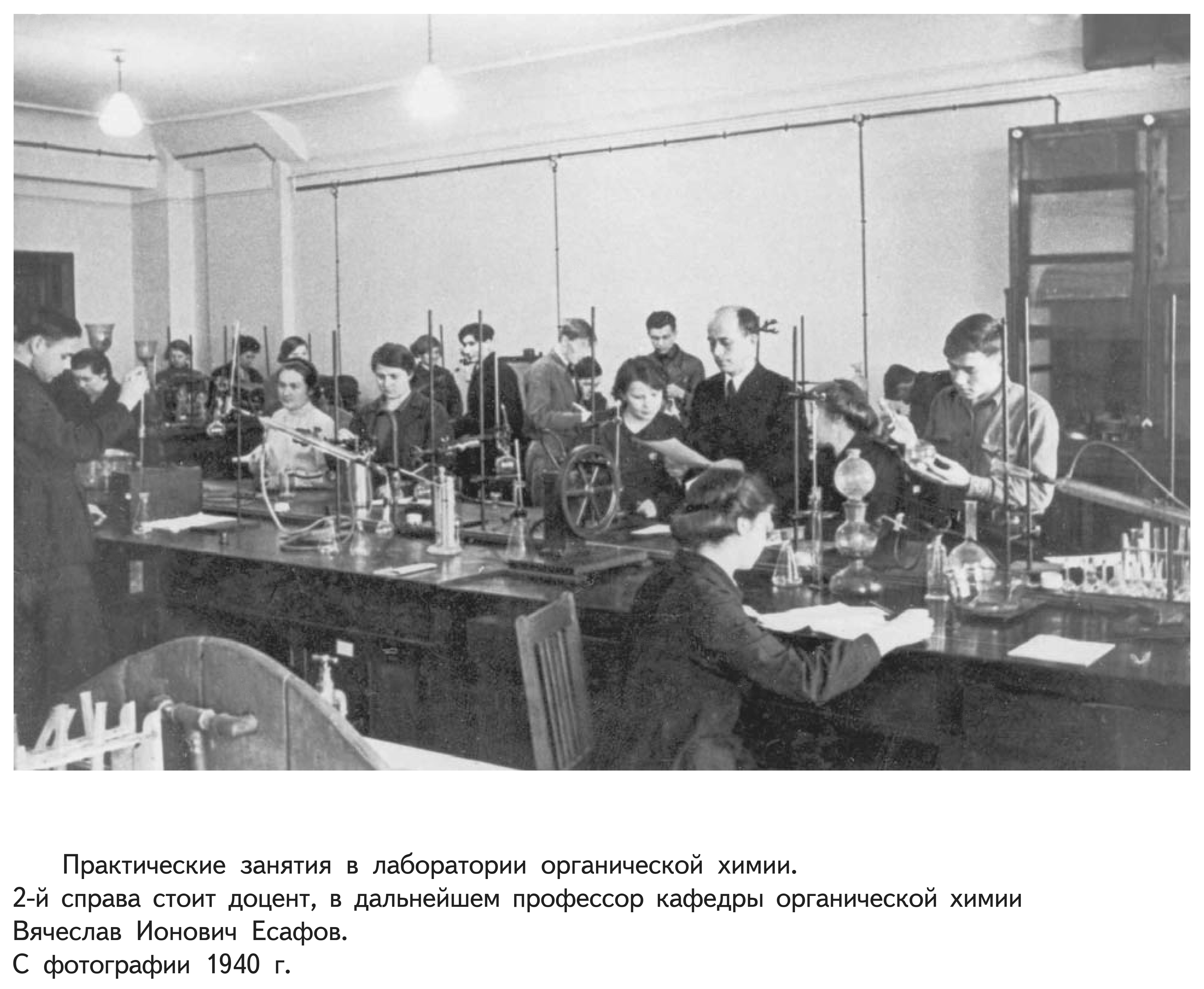 Практические занятия в лаборатории органической химии. Доцент, в дальнейшем профессор кафедры органической химии Есафов, Вячеслав Ионович — стоит 2-й справа